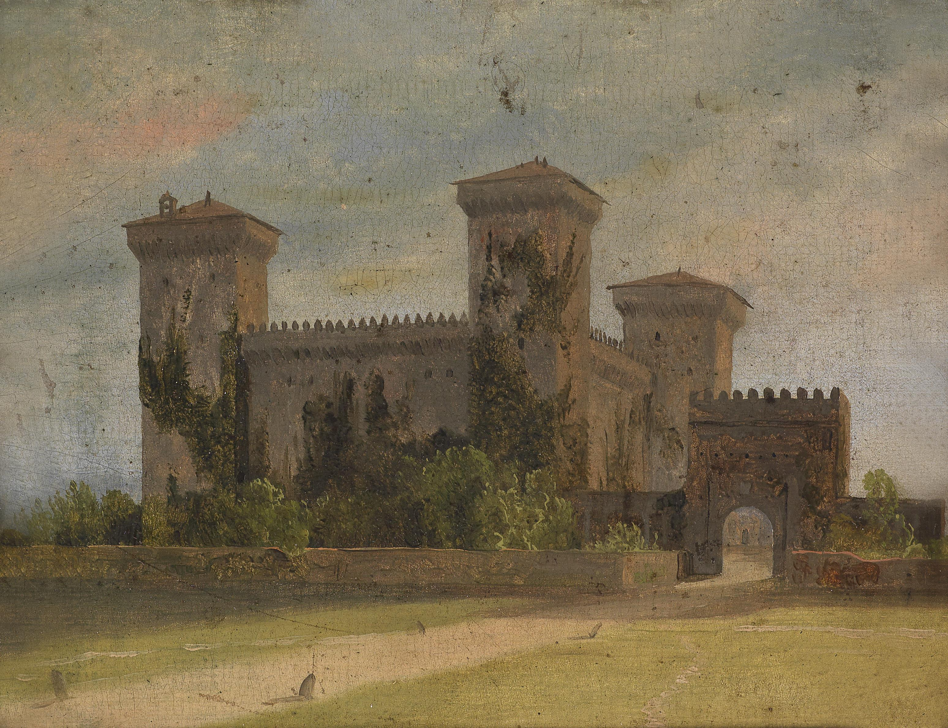 Castelguelfo bei Parma. Öl auf Karton, 14,5 x 18 cm